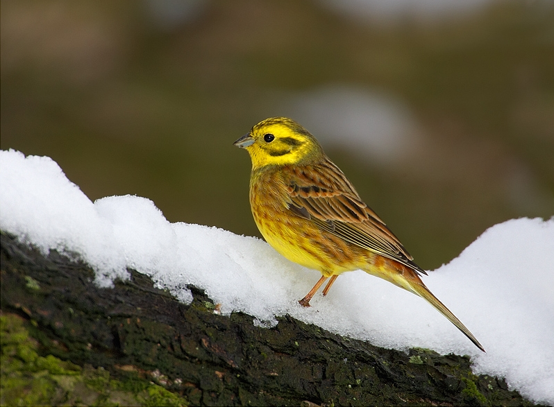 Emberiza citrinella, Litovelské pomoraví, CZ